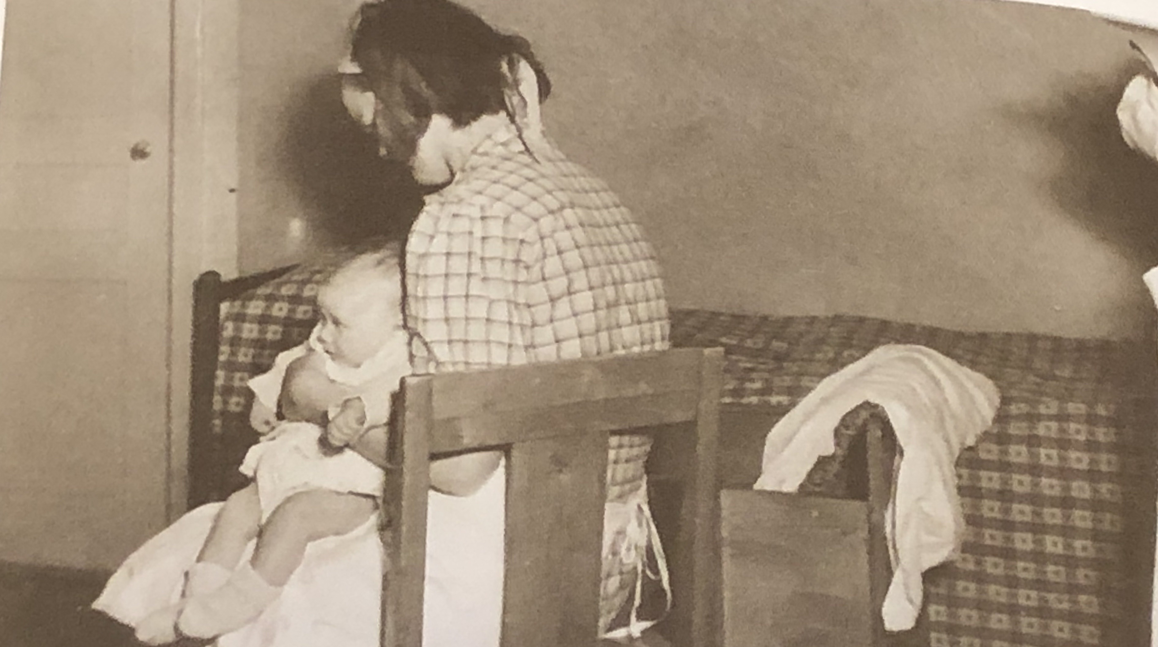 Bild på kvinnlig fånge med barn från 1940-talet. Bilden togs av Kriminalvården från kvinnofängelset i Växjö.